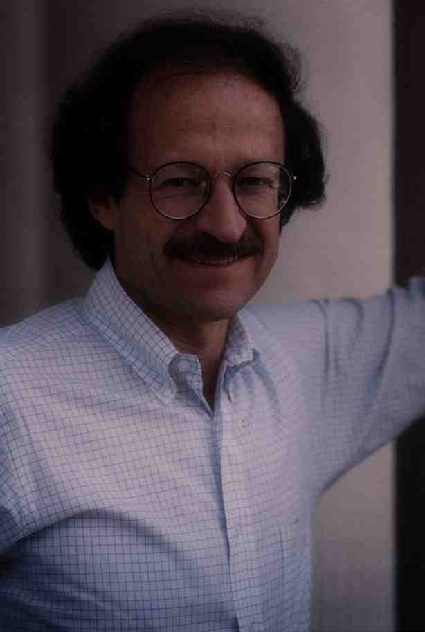 Harold Elliot Varmus